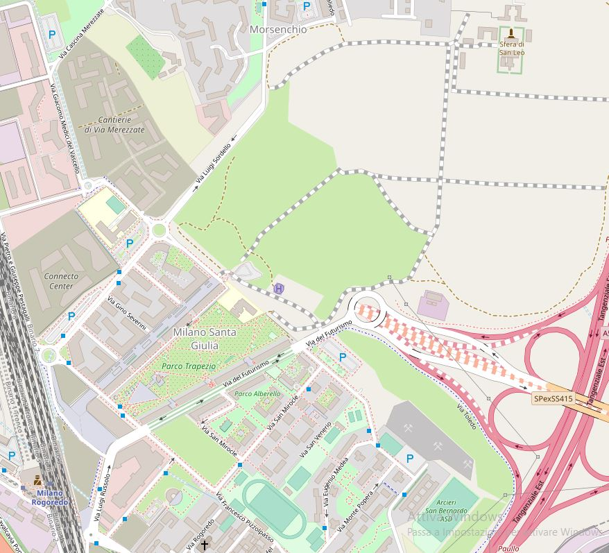 Milano santa giulia maggio 2020